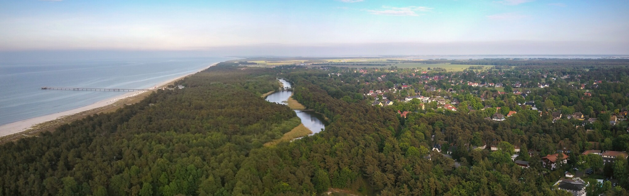 Prerow ist ein Seebad auf der Halbinsel Darß in Mecklenburg-Vorpommern. Links ragt die Seebrücke in die Ostsee, in der Mitte ist ein Ausläufer des Prerower Stroms zu sehen, der die Ortschaft vom Meer trennt. Rechts im Hintergrund das Boddenmeer.